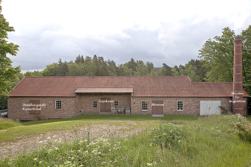 Entrée sidan